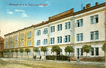 Kasárna 3. pěšího pluku v Kroměříži